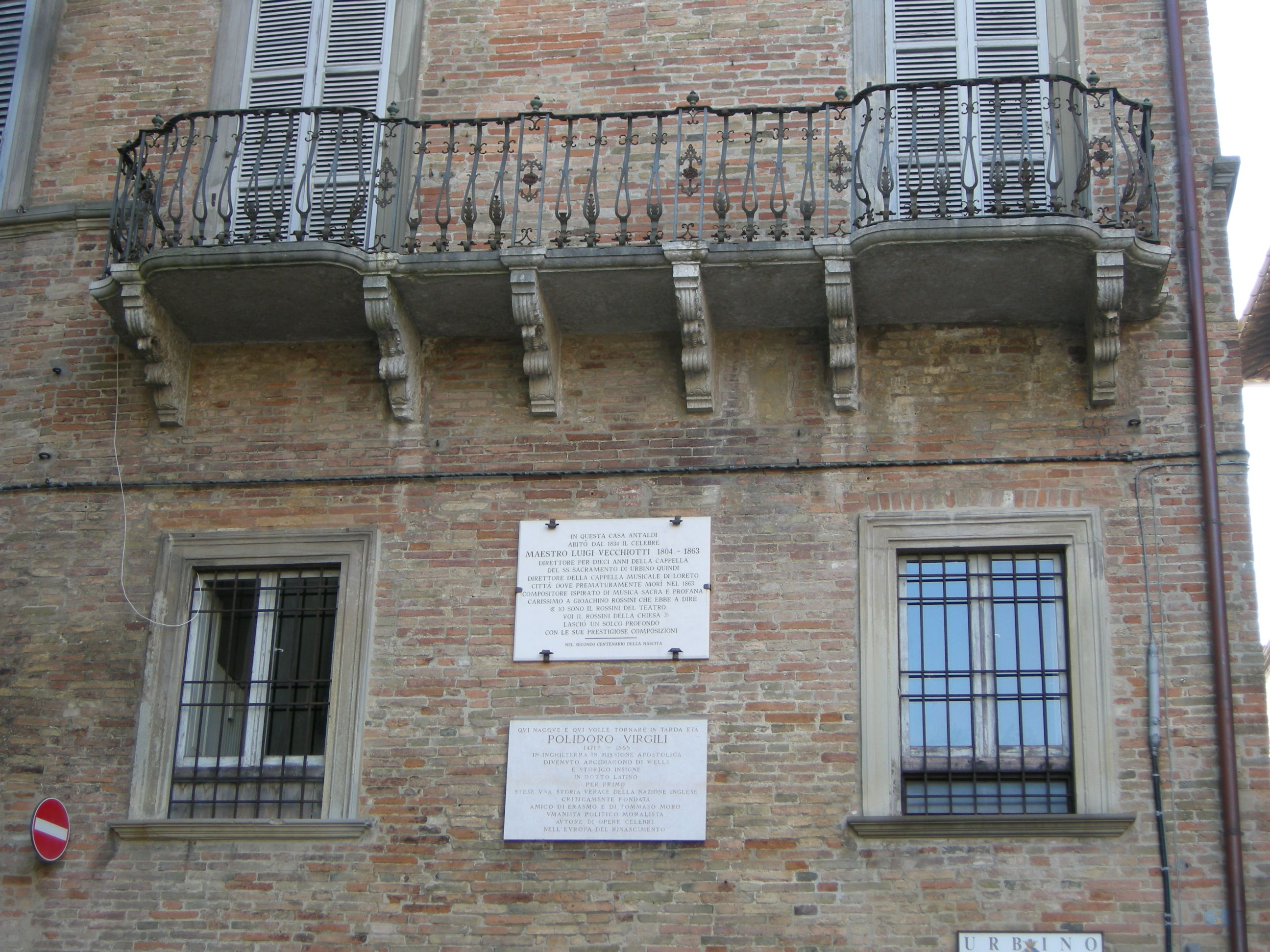 Urbino, targe virgilio vecchietti e polidoro virgili e balcone